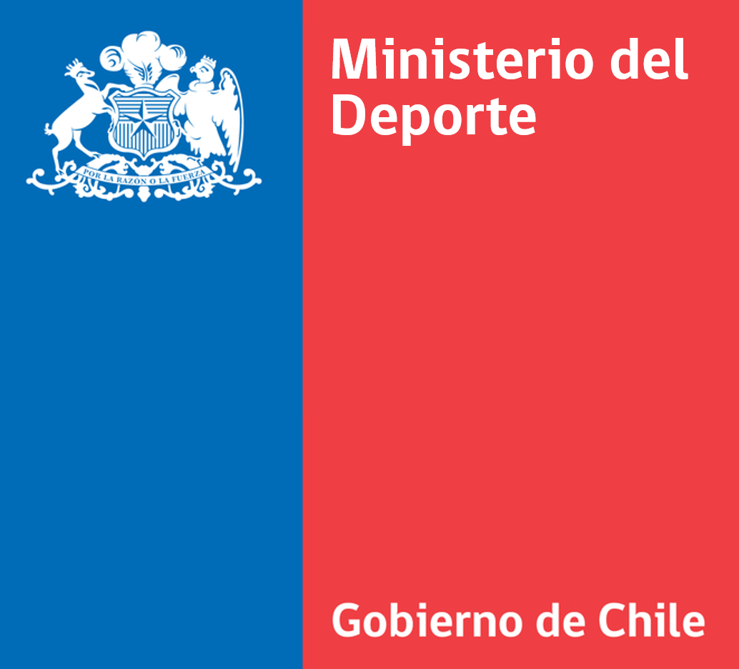 Logo del Ministerio del Deporte.